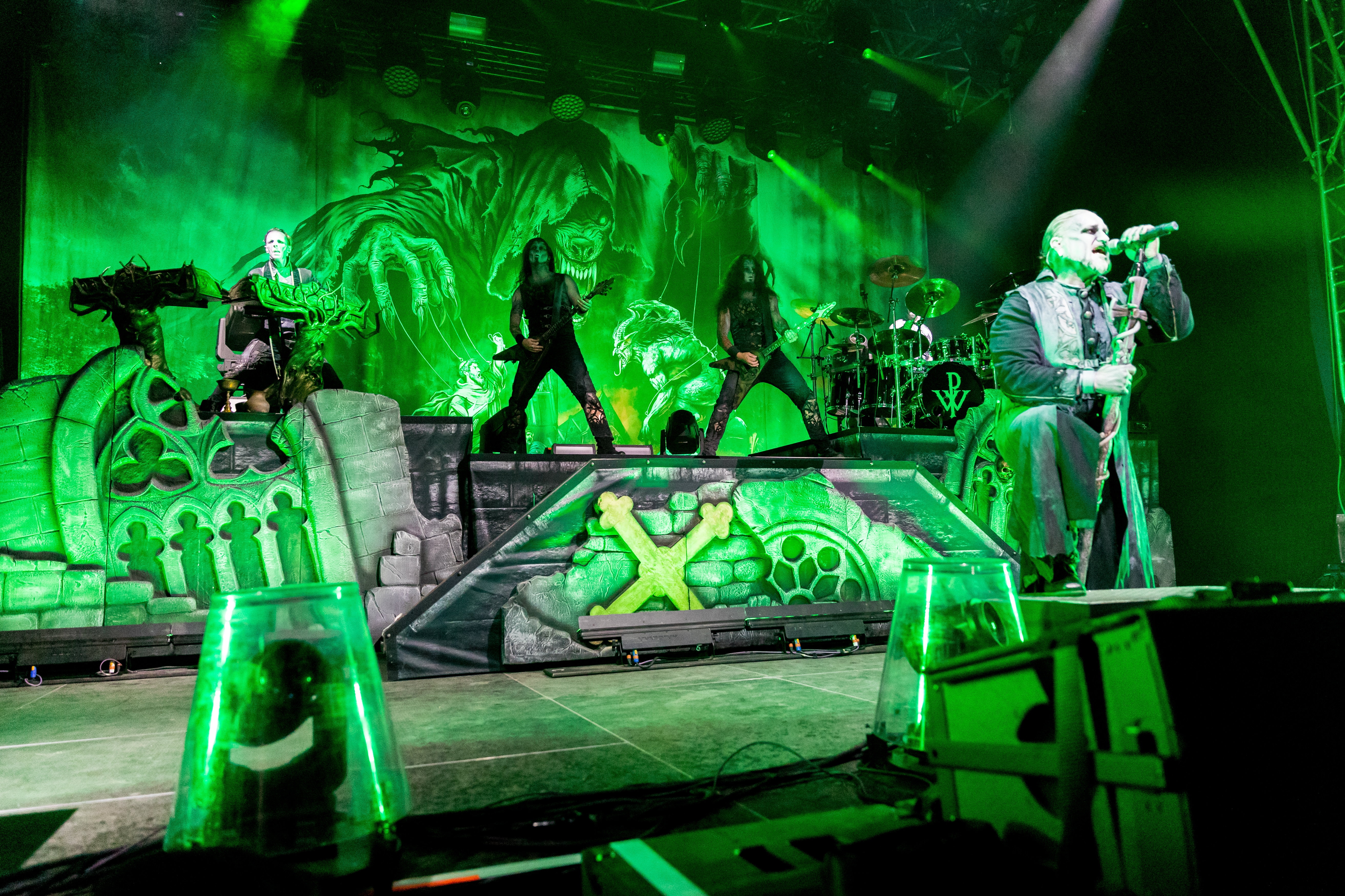 Powerwolf during Zeltfestival Rhein-Neckar ( at Maimarktgelände, Mannheim, Baden-Württemberg, Germany on 2019-06-18, Photo: Sven Mandel Promotion by Delta Konzerte (